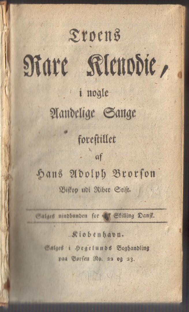 Tittelblad til Troens rare Klenodie, Kjøbenhavn 1742